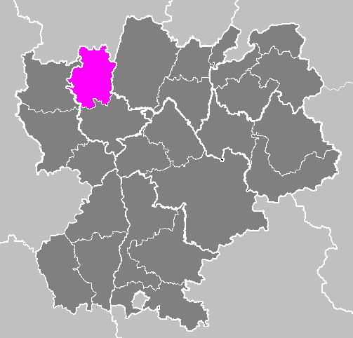 Maps of arrondissements and cantons of France: Arrondissement de Villefranche-sur-Saône.PNG (Région Rhône-Alpes)